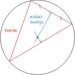 Middelloodlijnen van een driehoek van koorden snijden elkaar in het middelpunt van een cirkel. (Eigen tekening met Paint)